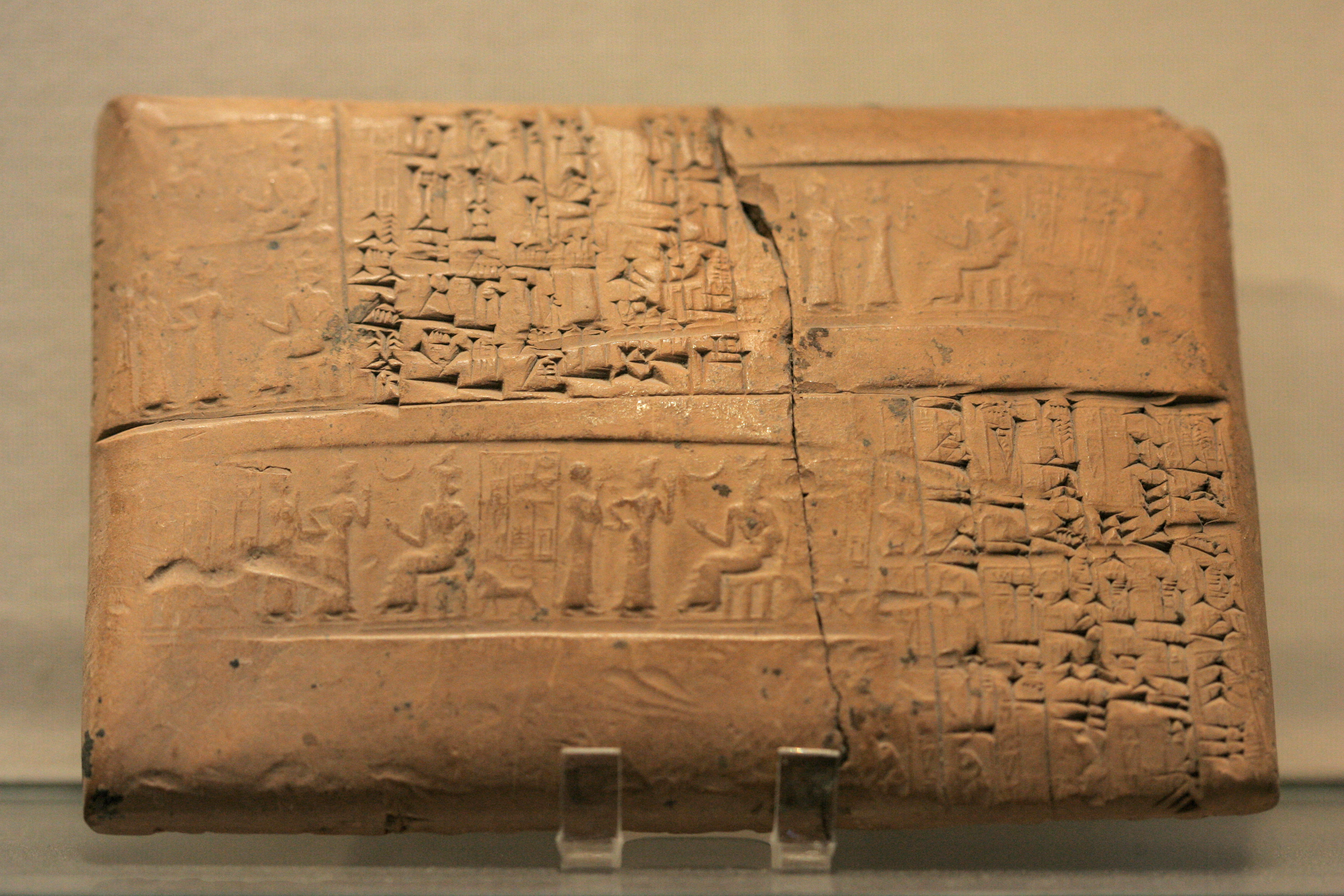 Devis de travail de labour et de hersage. Salaire d'ouvriers. Sceau du scribe Shaninga (Revers).